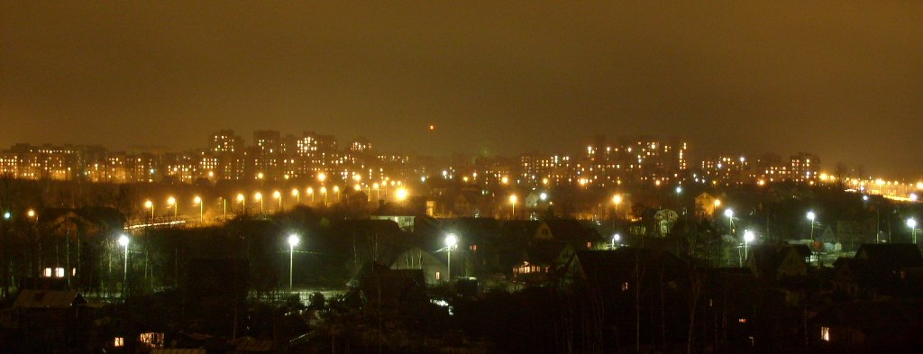 Панорама Старого Петергофа